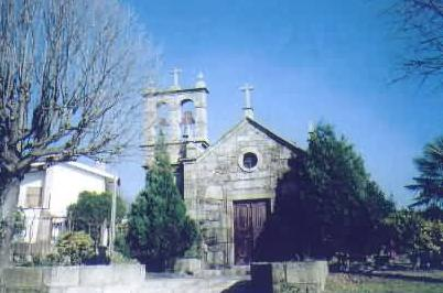 Igreja Antiga